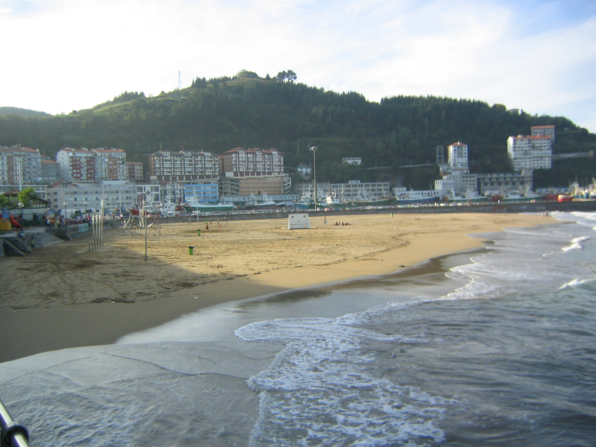 Playa de Arrigorri en Ondarroa, Bizkaia, País Vasco, España.